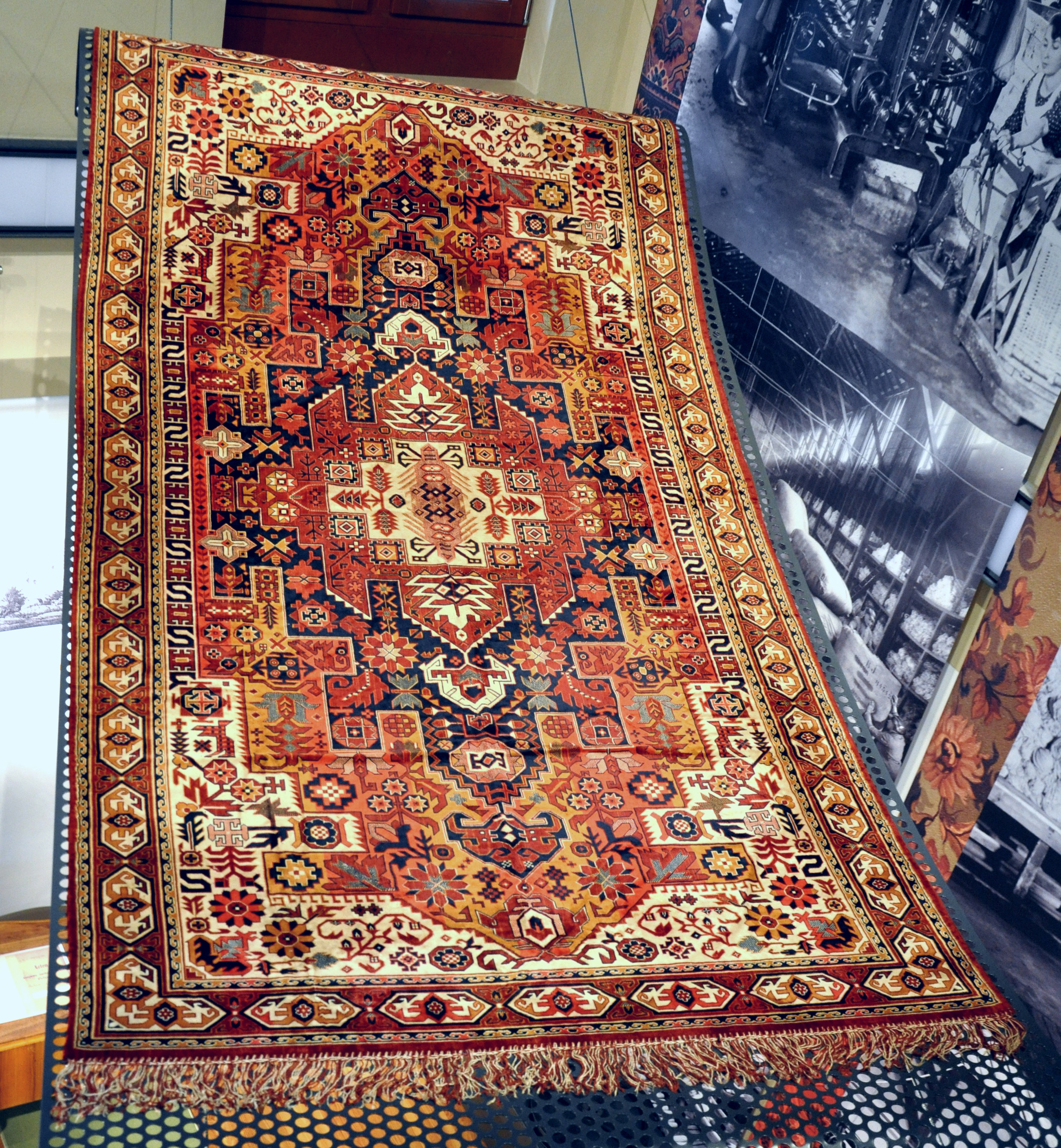 Oelsnitz/Vogtland, Teppich-Museum Schloss Voigtsberg Diwandecke, Hersteller unbekannt, um 1910, Technik: gewebt (Moquettenstuhl), Genre/Stil: anatolisch, Dessin: jacquardgemustert, 4-chorig; Material: Wolle